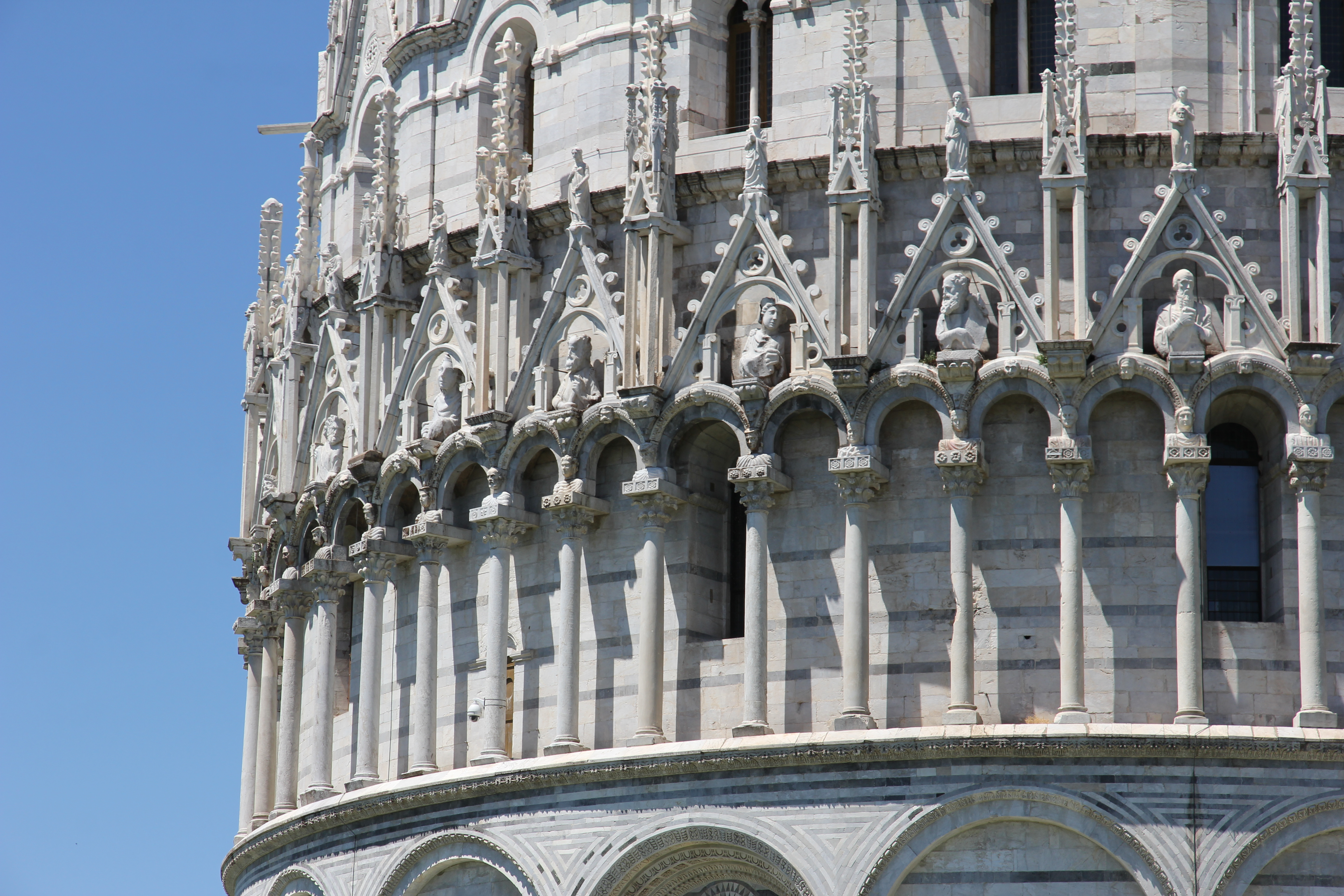 Pisa, battistero di San Giovanni